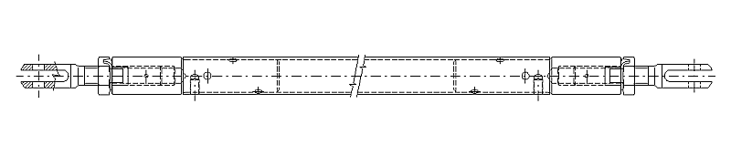 Táhlo řízení letadla sestavené z trubky z tvrdé hliníkové slitiny a dvou stavitelných vidlicových koncovek